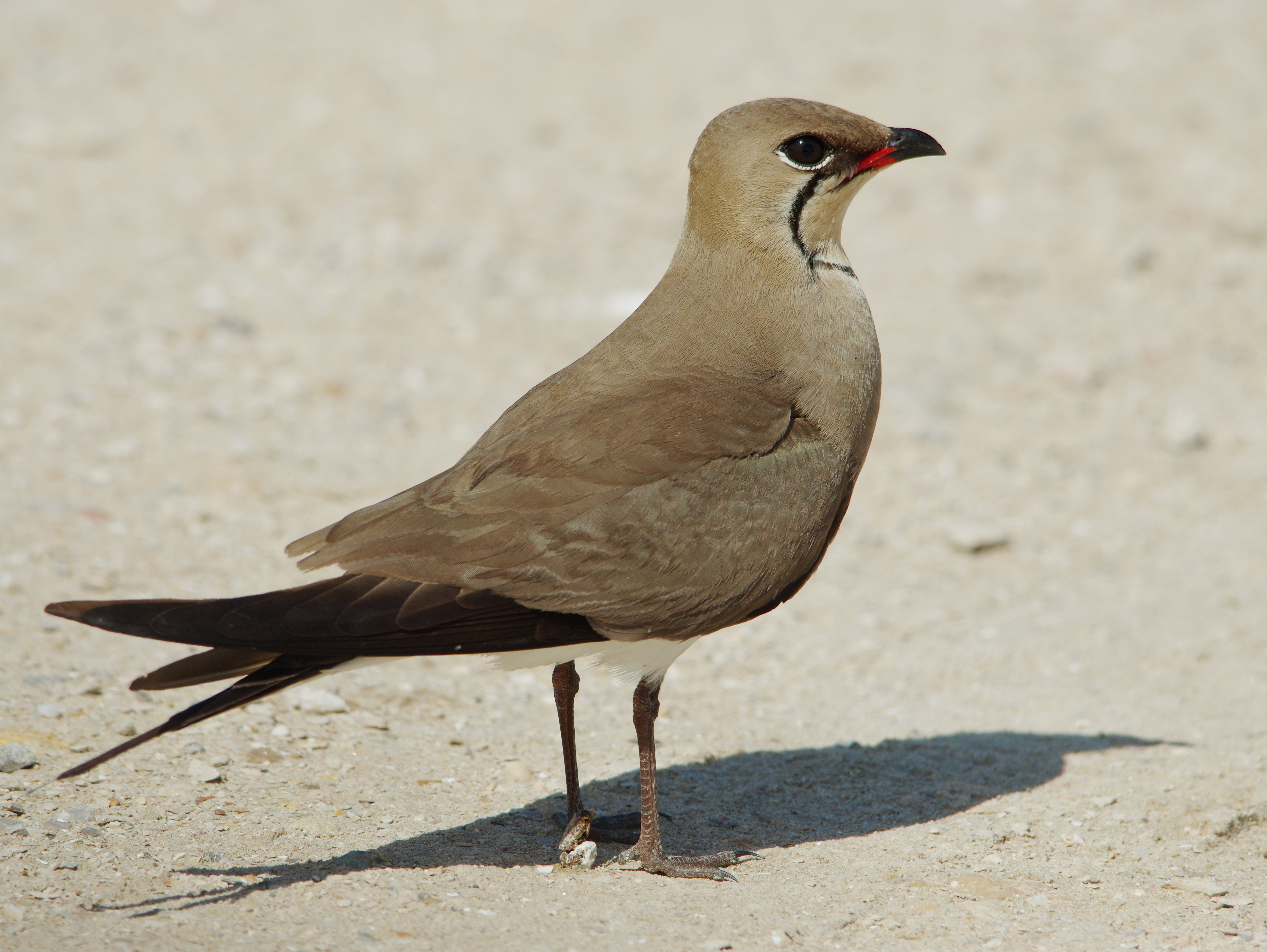 Glaréole à collier au lac de Tunis